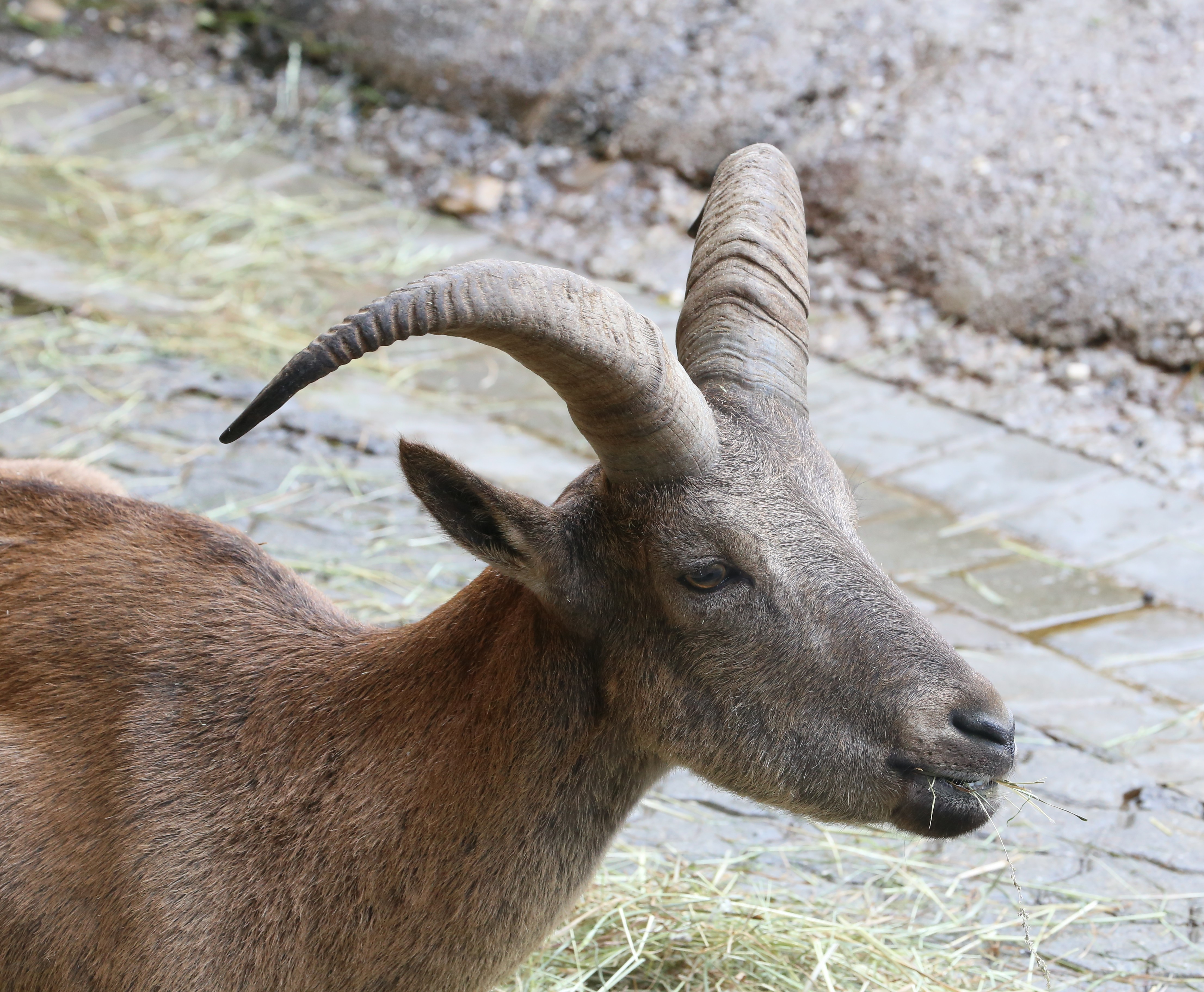 Daghestanischer Tur (Ostkaukasischer Steinbock), Capra cylindricornis, Zoo Augsburg